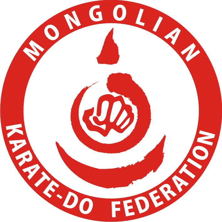 Монгол: Монголын Карате Догийн холбооны лого